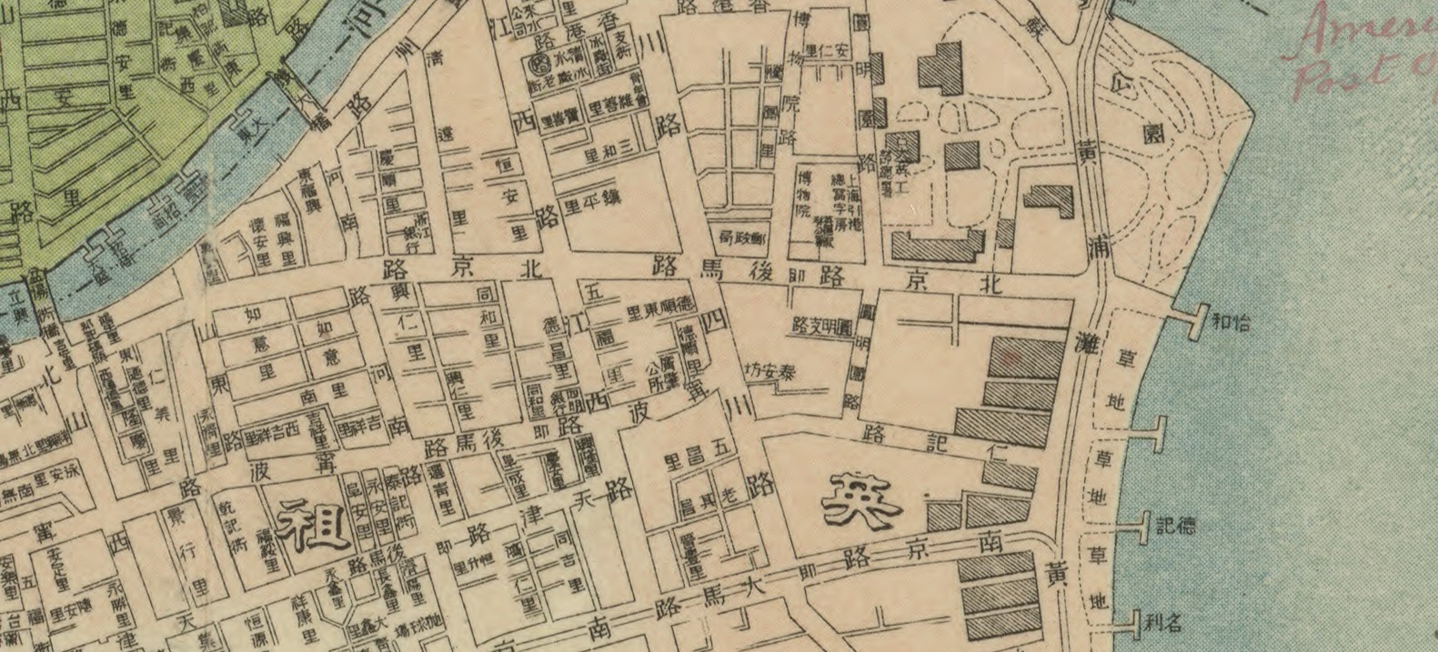 中文（中国大陆）: 1913年上海商务印书馆出版《实测上海城厢租借图》上的兴仁里